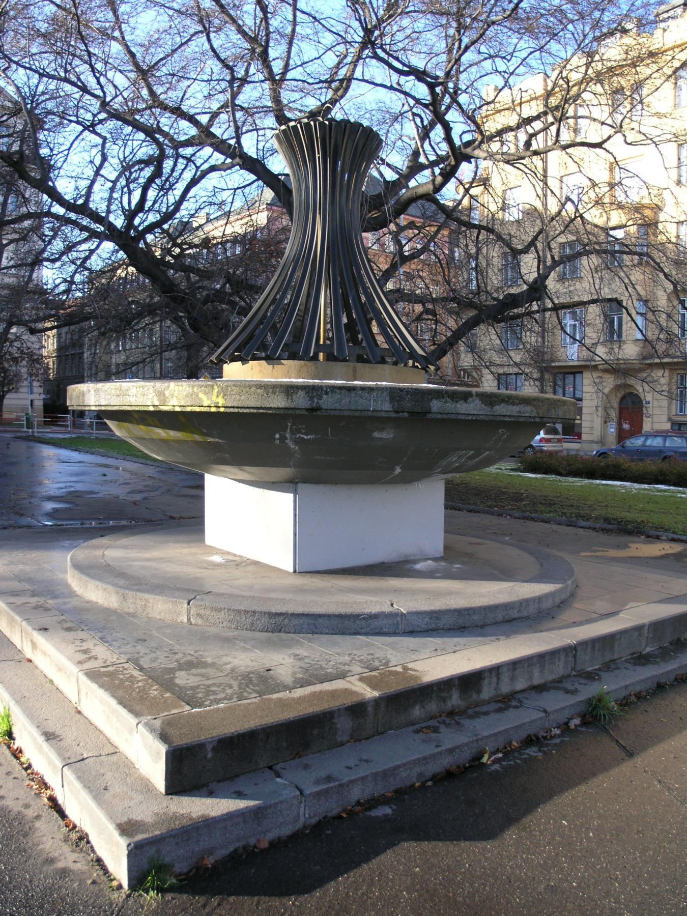 Dienzenhoferovy sady (Praha, Smíchov)